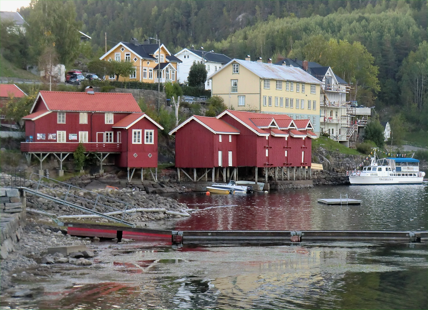 Prestestranda i 2018